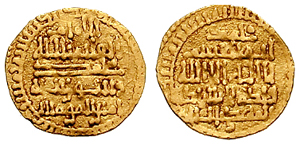 Dinar de ouro do califa fatímida Alcaim